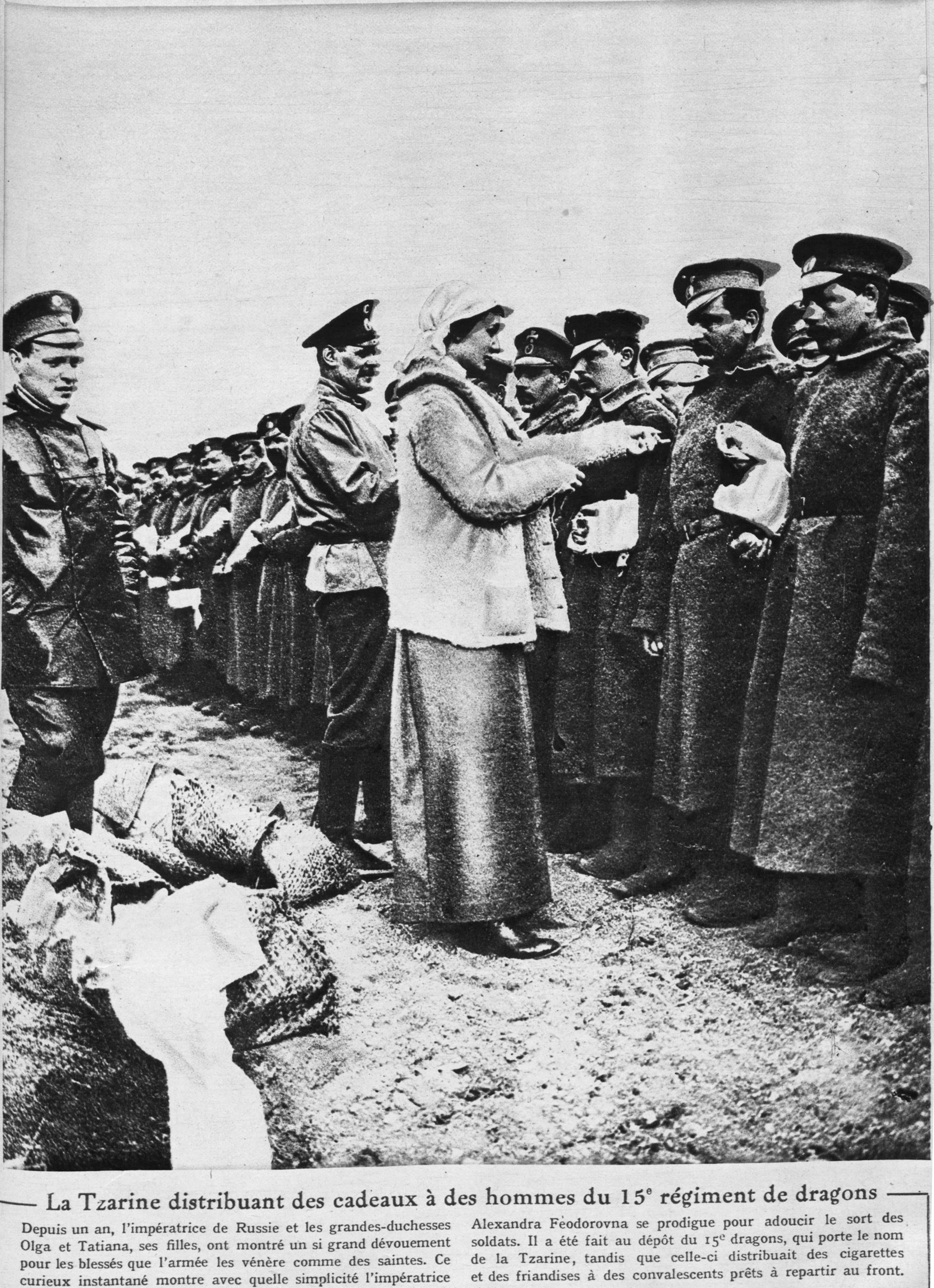 publié dans l'hebdomadaire le MIroir N°_90_page 14